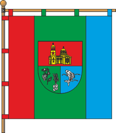 Прапор села Криничне (Болградський район)